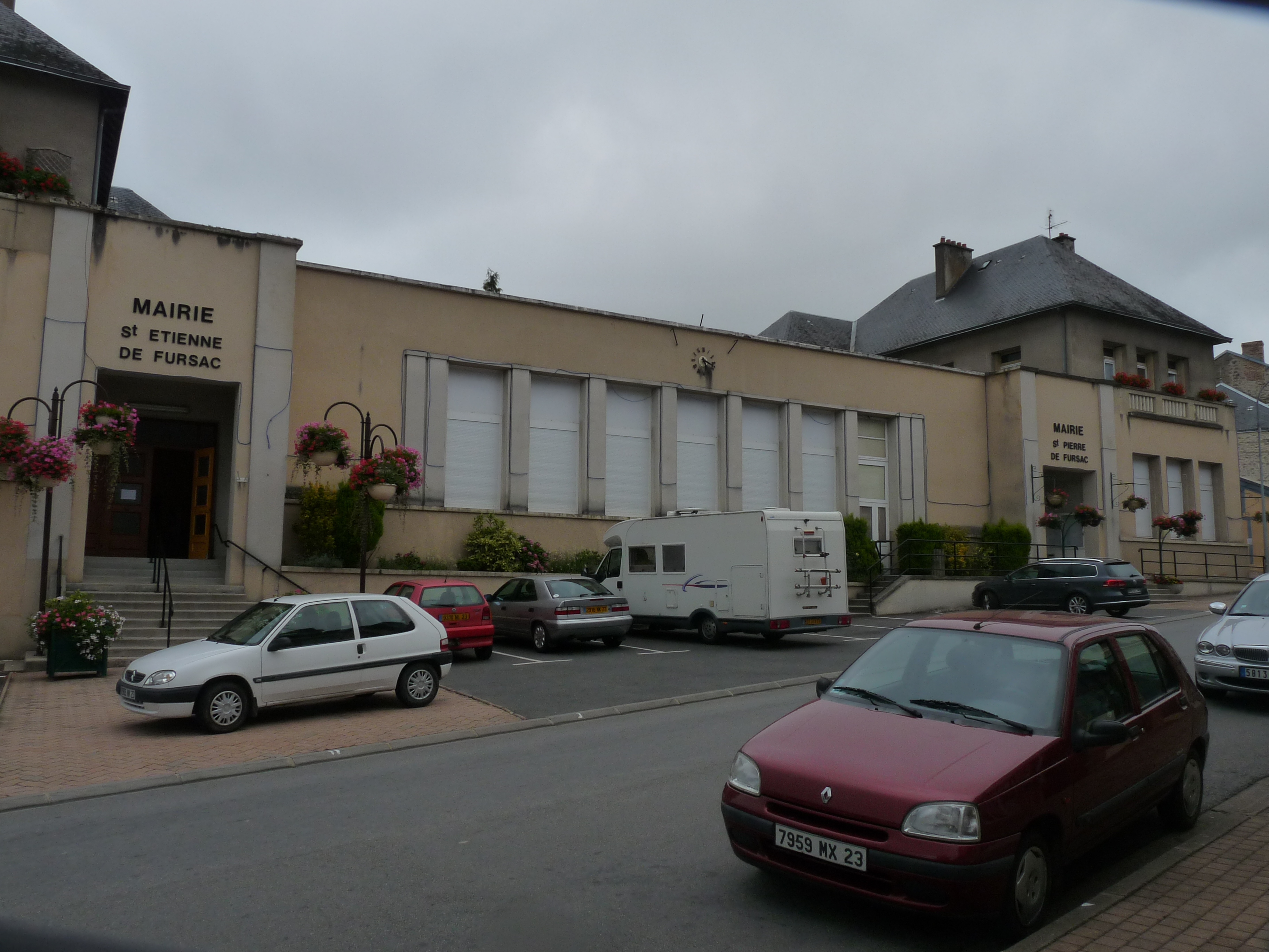 Le bâtiment réunissant les mairies de St Etienne-de-Fursac et de St Pierre-de-Fursac